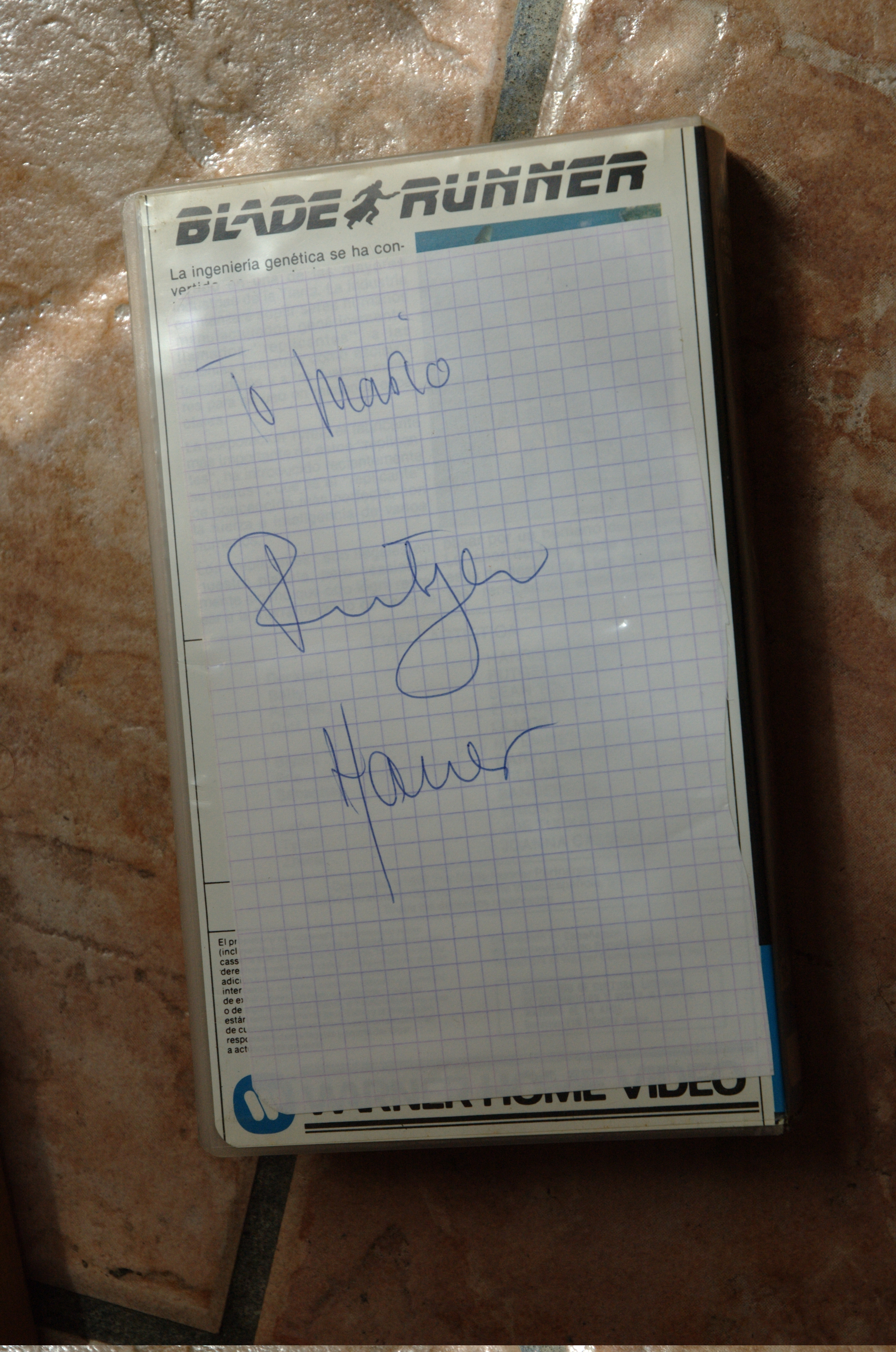 De hace unos años, cuando trabajé en el Festival Internacional de Cine de San Sebastián. Uno de los dos autógrafos que he pedido en mi vida. El otro fue a Emma Thompson y me lo robaron junto a mi cartera en Polonia. Tengo otro autógrafo de Quentin Tarantino, que no pedí, pero que me dio él para agradecer mi trabajo como RRPP en el Festival de Cine cuando vino como invitado a mostrar Pulp Fiction. La historia aquí